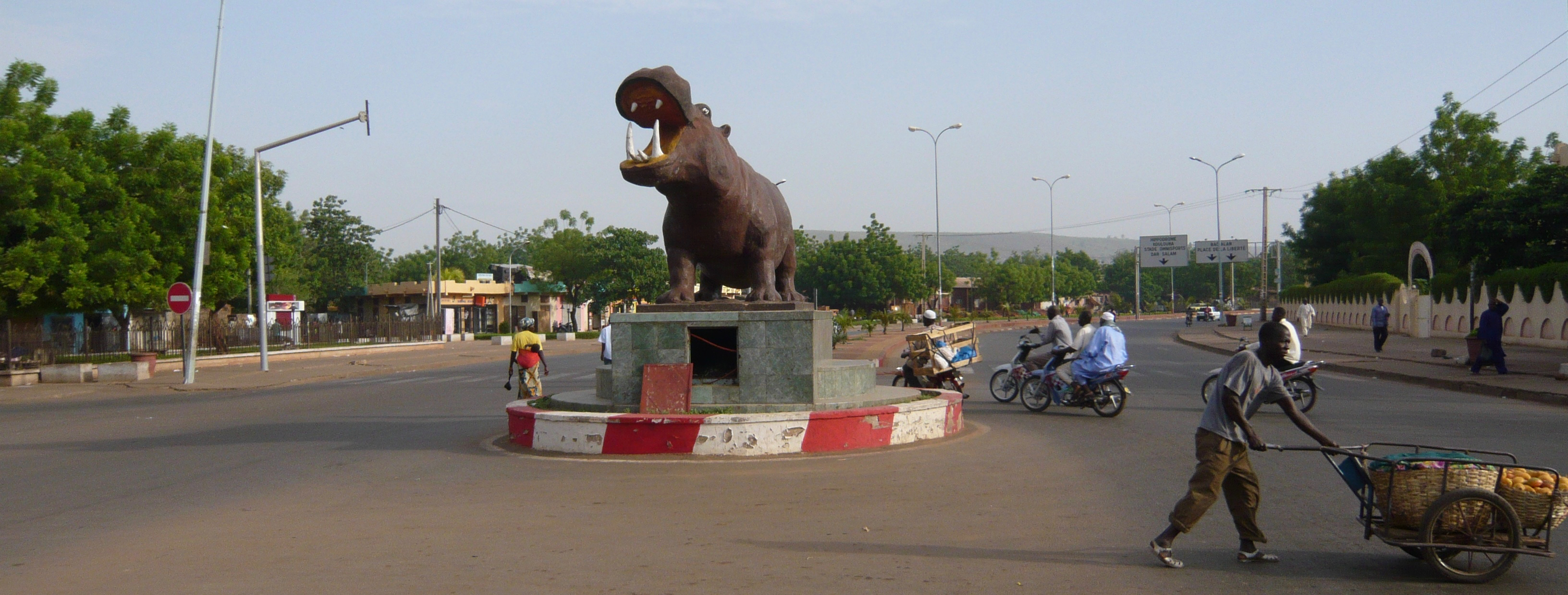 L'hippopotame, Boulevard de l'indépendance, Bolibana - Bamako, Mali